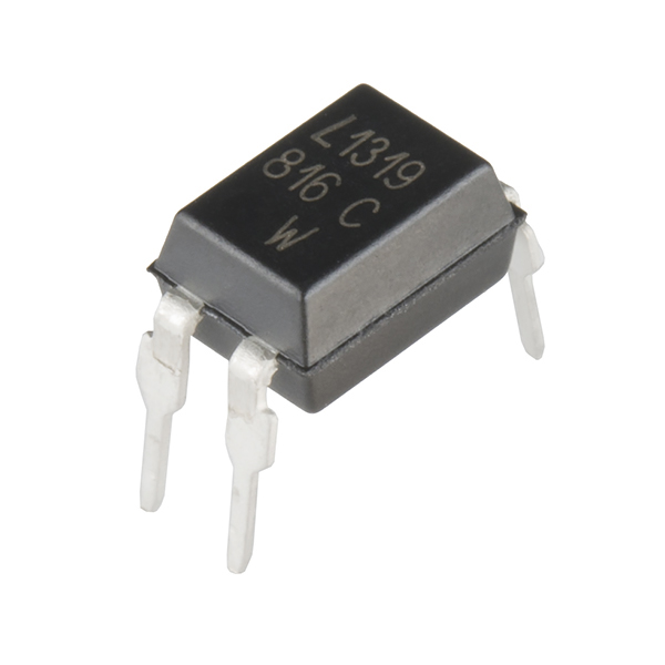 LTV-816 1 channel opto-isolator.